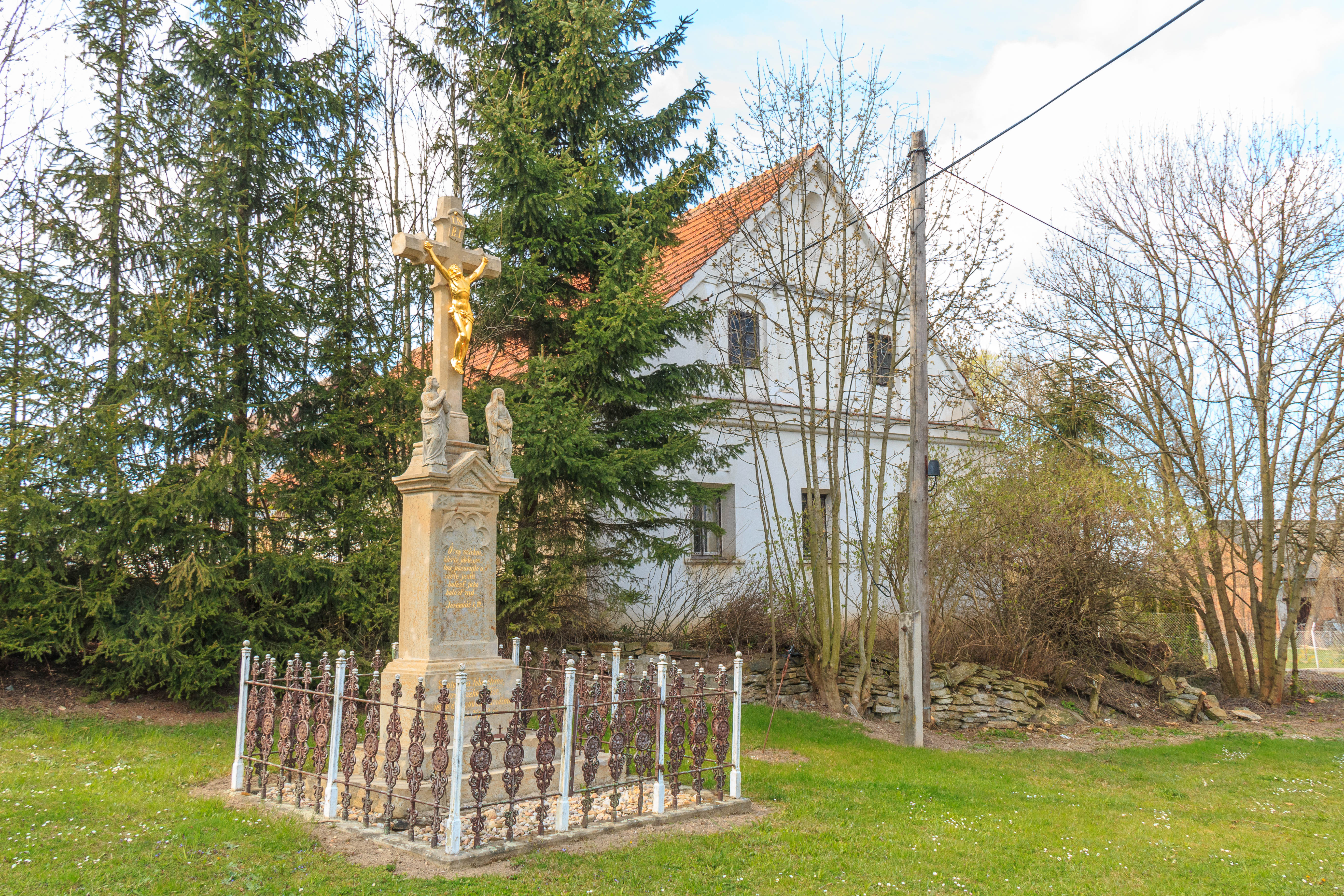 Doubravice u Náhořan kříž